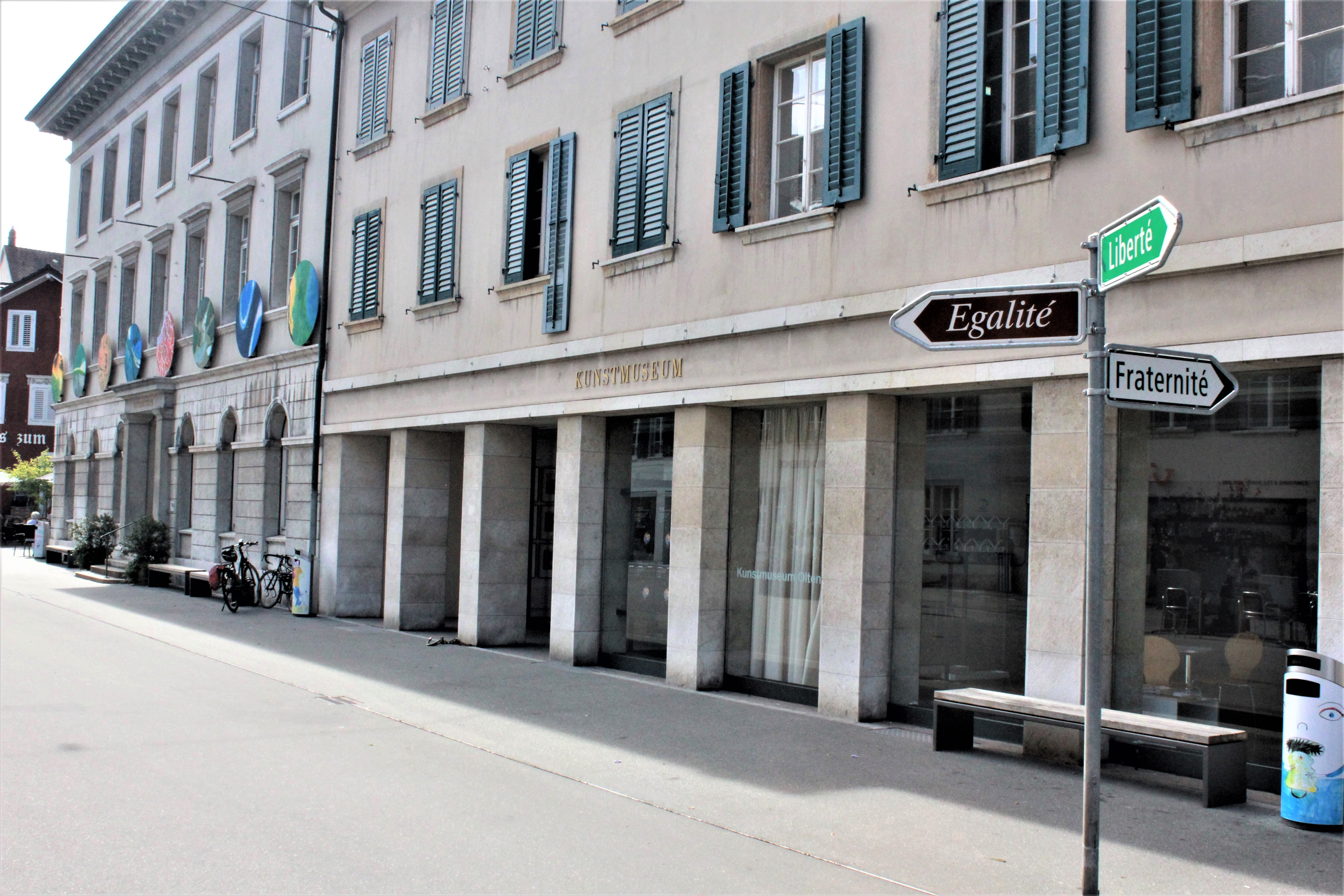 Das Naturmuseum (links) und das Kunstmuseum Olten (rechts) an der Kirchgasse im Sommer 2017. Das Wegweiser-Objekt vor dem Kunstmuseum gehört zur Ausstellung "Voyage, Voyage! Über das Reisen in der Kunst".